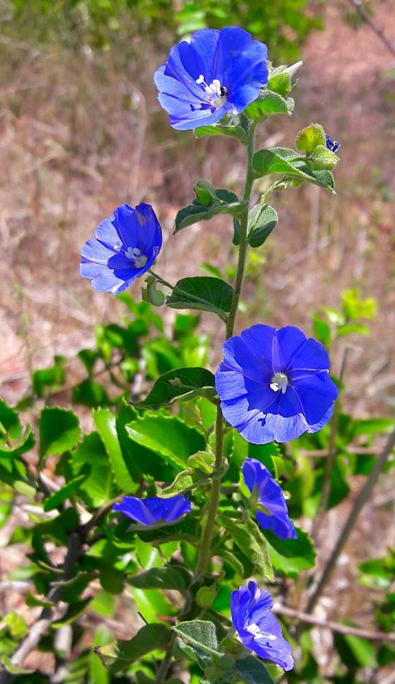 Belíssima flor da Caatinga